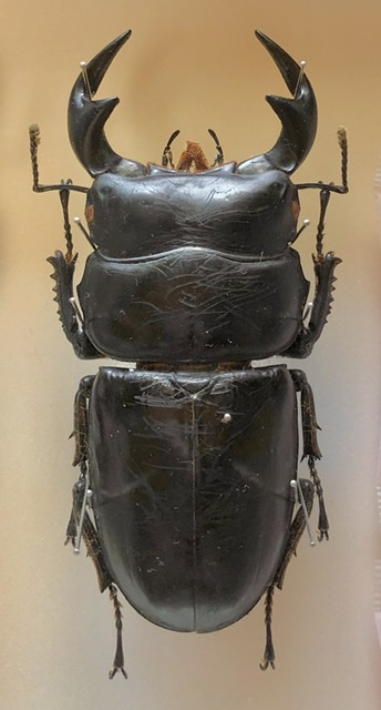 アンタエウス タイ産 86㎜ ギネス2